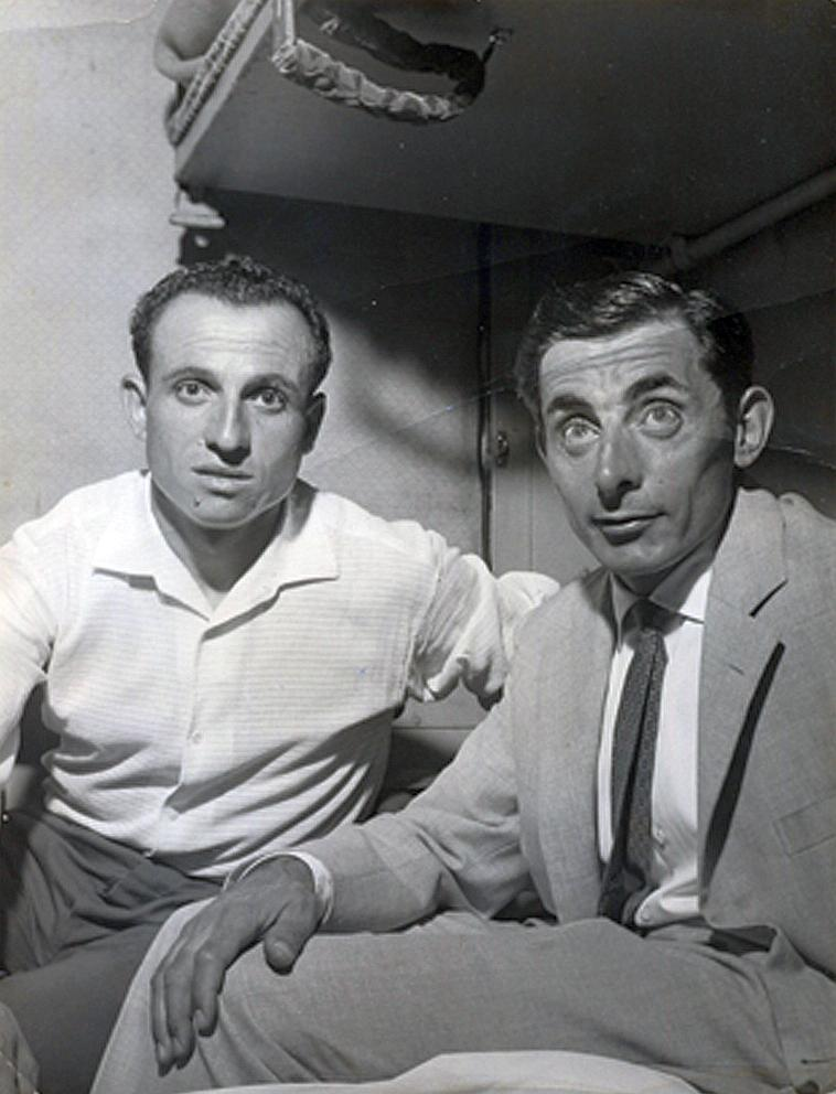 I ciclisti Ercole Baldini (Forlì, 26 gennaio 1933), a sinistra, e Fausto Coppi (Castellania, 15 settembre 1919 – Tortona, 2 gennaio 1960), a destra, Milano, 26 agosto 1958